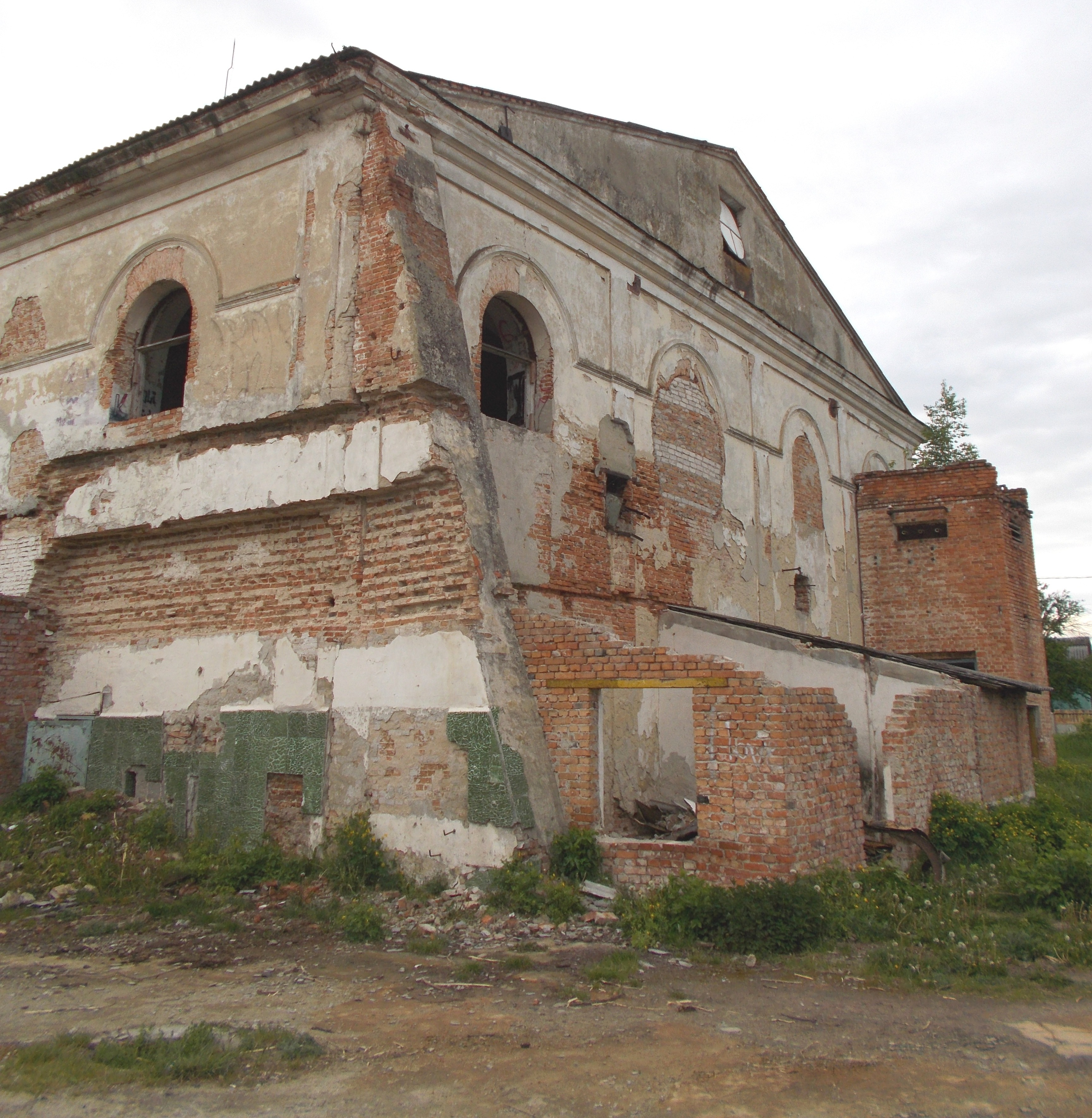 Здание бывшей синагоги в Кобрине.